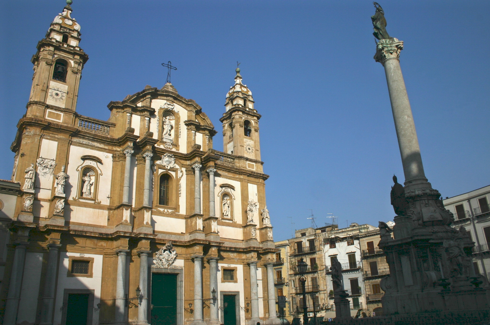 Église Saint-Dominique à Palerme